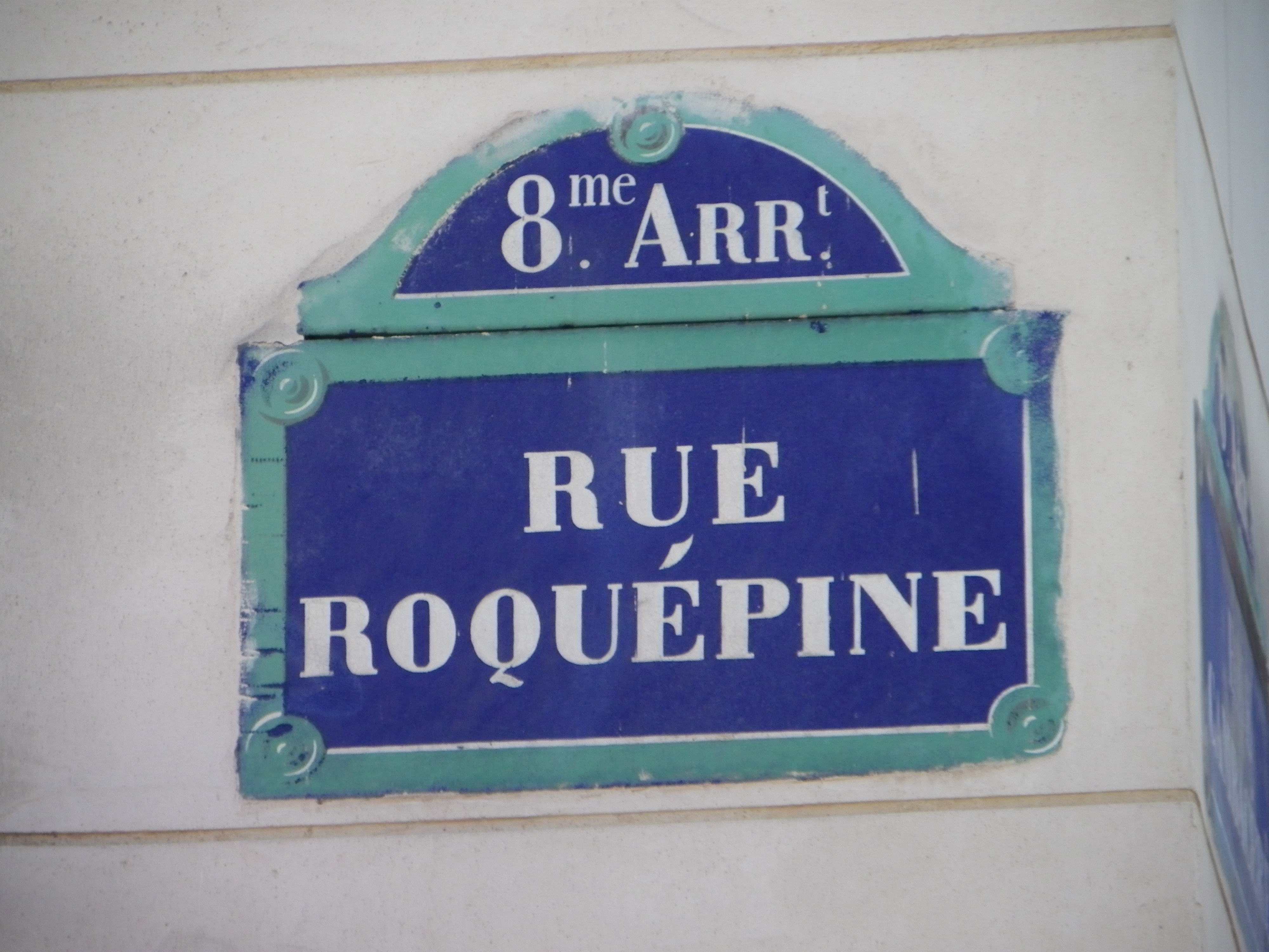 Plaque rue Roquépine à Paris